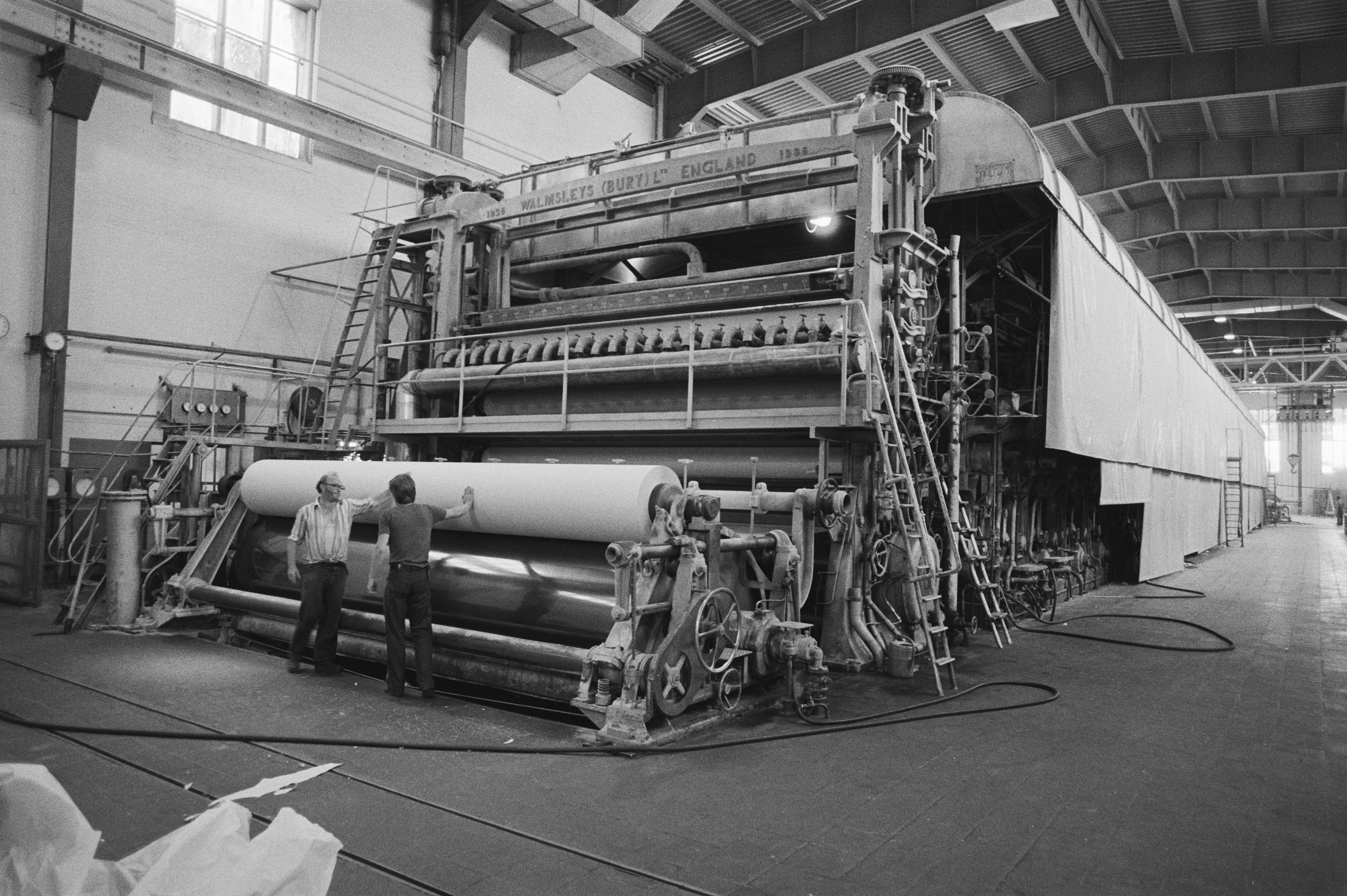 Collectie / Archief : Fotocollectie Anefo Reportage / Serie : Krantenpapierfabriek Van Gelder in Velzen met sluiting bedreigd Beschrijving : Papiermachine "PM 18" in bedrijf Datum : 26 augustus 1980 Locatie : Noord-Holland, Velzen Trefwoorden : bedrijfssluitingen, fabrieken, machines, papier Fotograaf : Antonisse, Marcel / Anefo Auteursrechthebbende : Nationaal Archief Materiaalsoort : Negatief (zwart/wit) Nummer archiefinventaris : bekijk toegang 2.24.01.05 Bestanddeelnummer : 930-9821